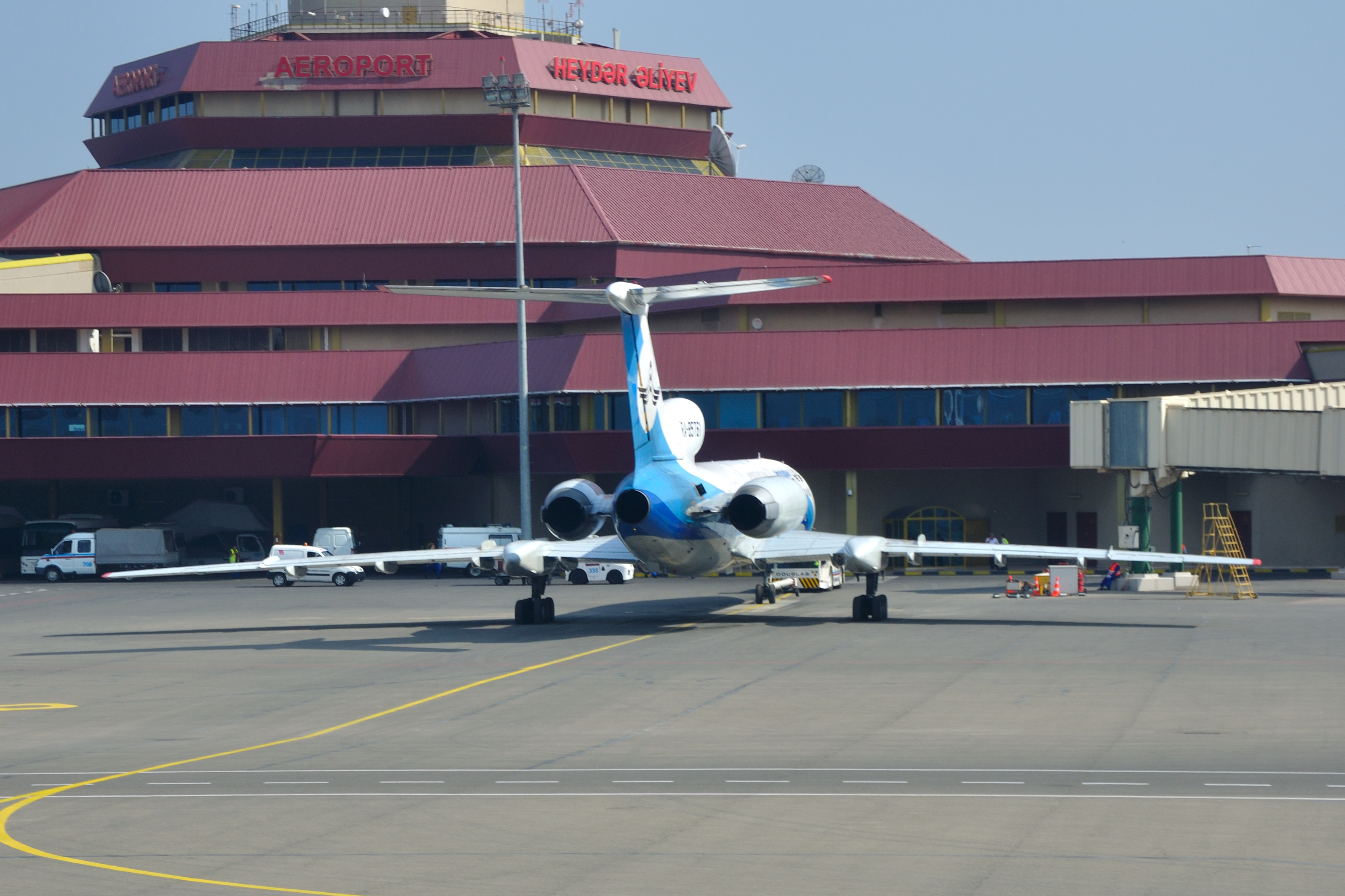 Azerbaijan, Heydar Aliyev International Airport in Baku